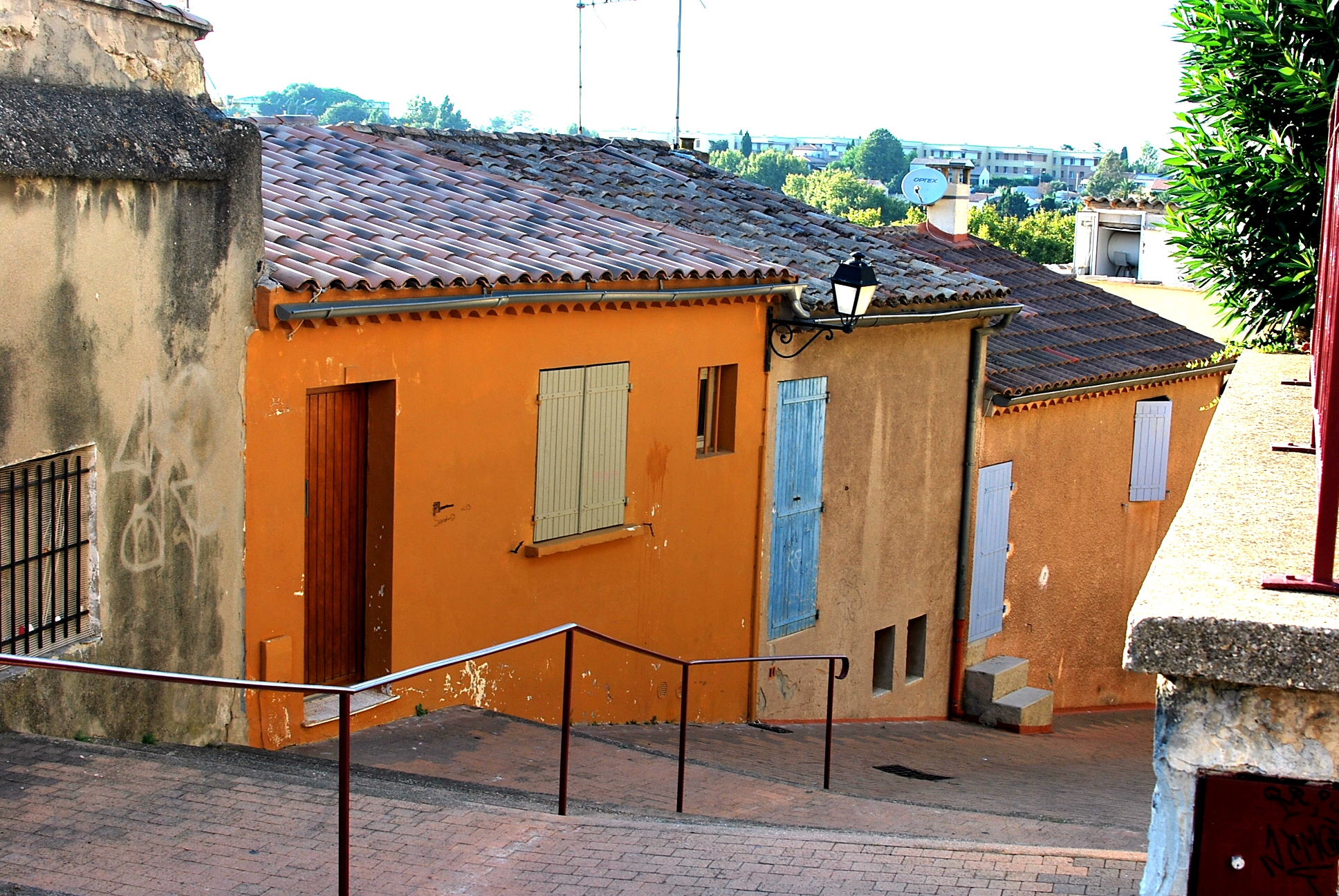 rue piétonne dans la vieille ville d'Istres